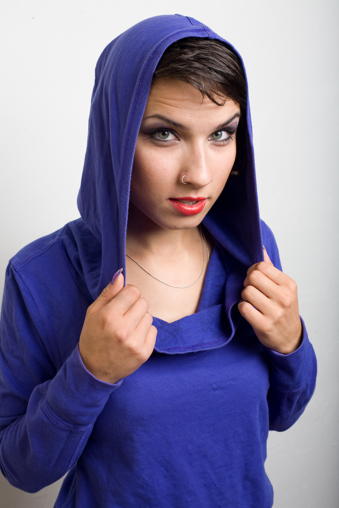 Portrait von Sookee (Nora Hantzsch) - fotografiert von diktat (Mario Thieme)